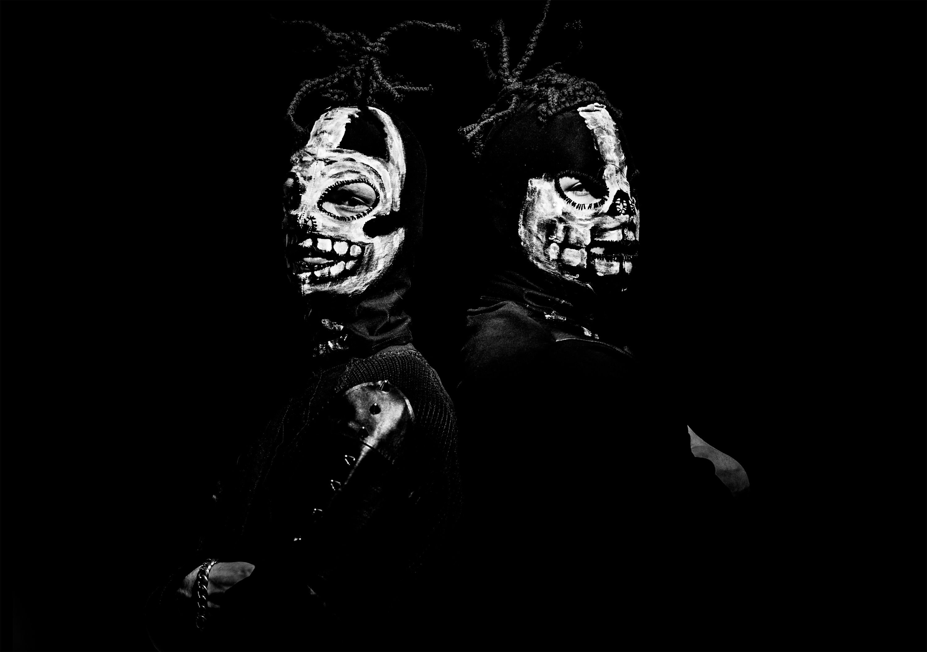 Genetikk (2013)